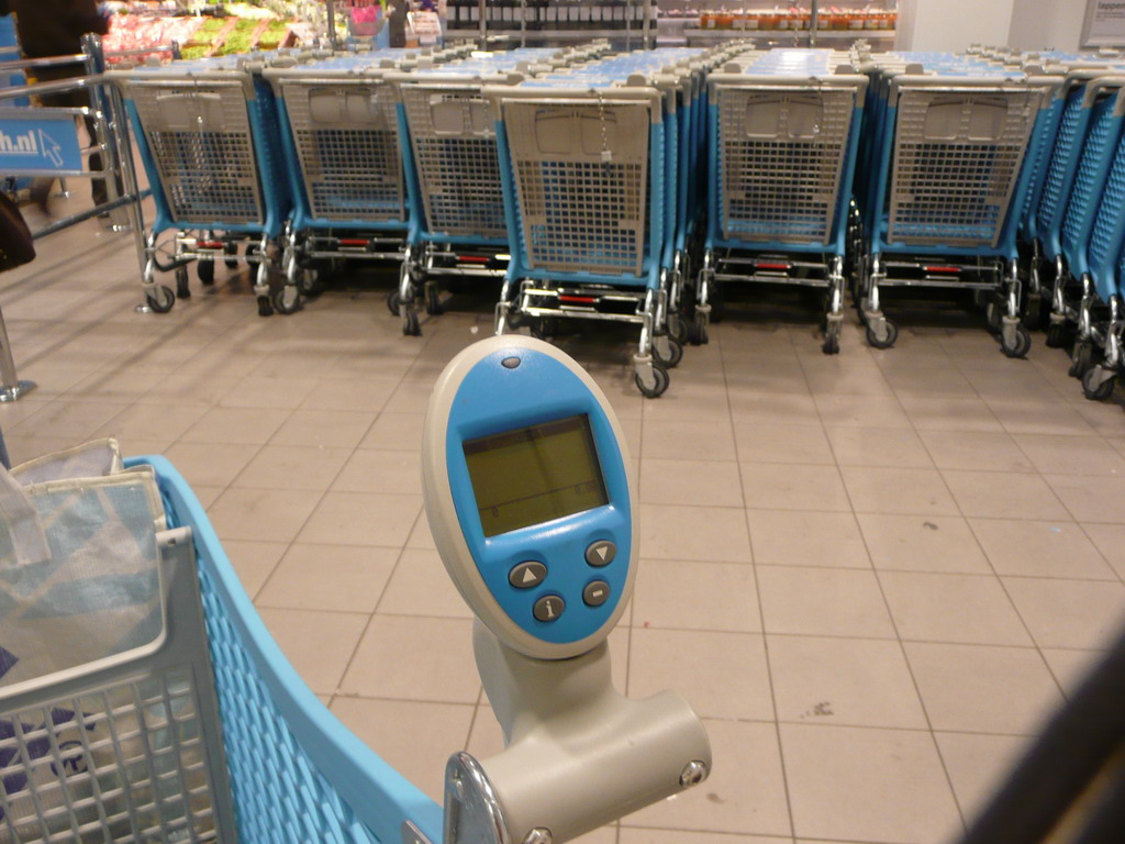 Handscan op winkelwagentje en gaan!